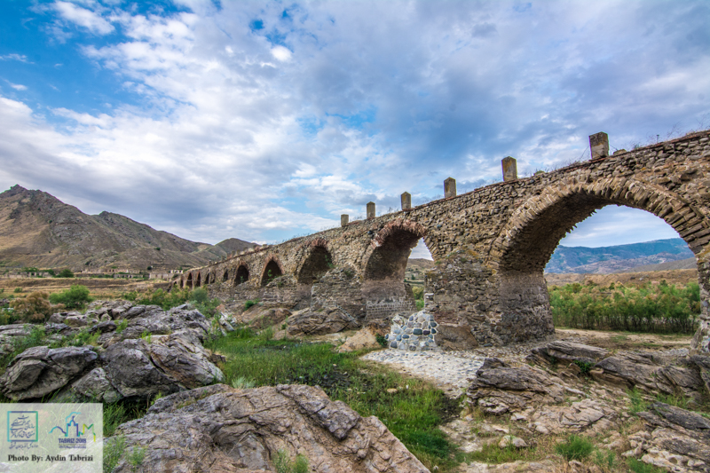 پل بزرگ خداآفرین